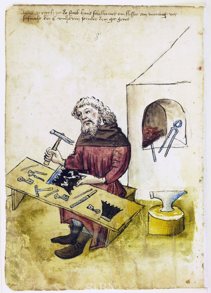 hans (Hans) schelhamer (Schelhamer; Schellhammer) , slosser (Schlosser) Transkription und weitere Informationen